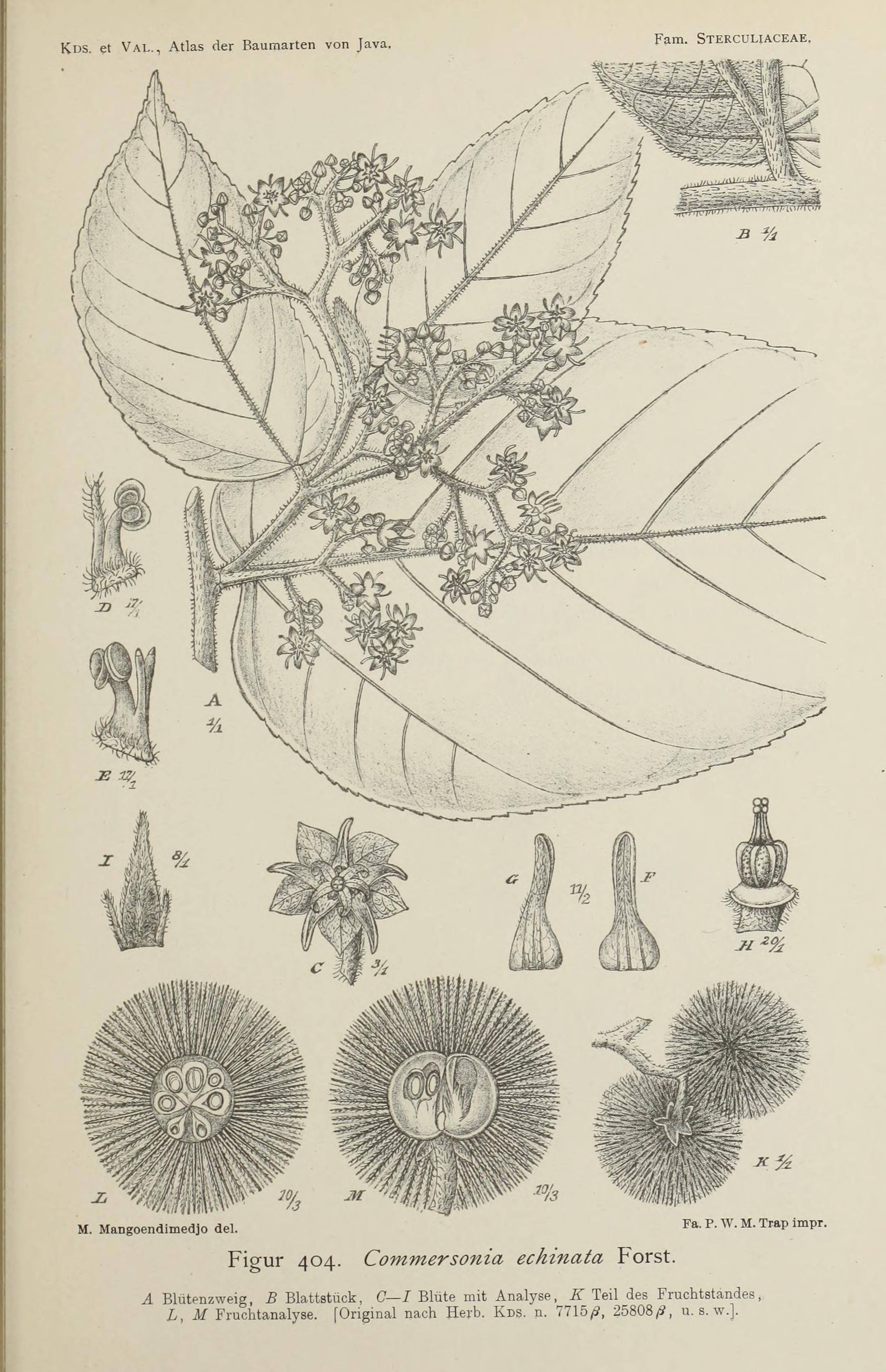 Atlas der baumarten von Java : im anschluss an die "Bijdragen tot de kennis der boomsoorten van Java" / zusammengestellt von dr. S.H. Koorders und dr. Th. Valeton ; mit unterstützung der Niederländsch- indischen regierung ; Herausgegeben von dr. S.H. Koorders.